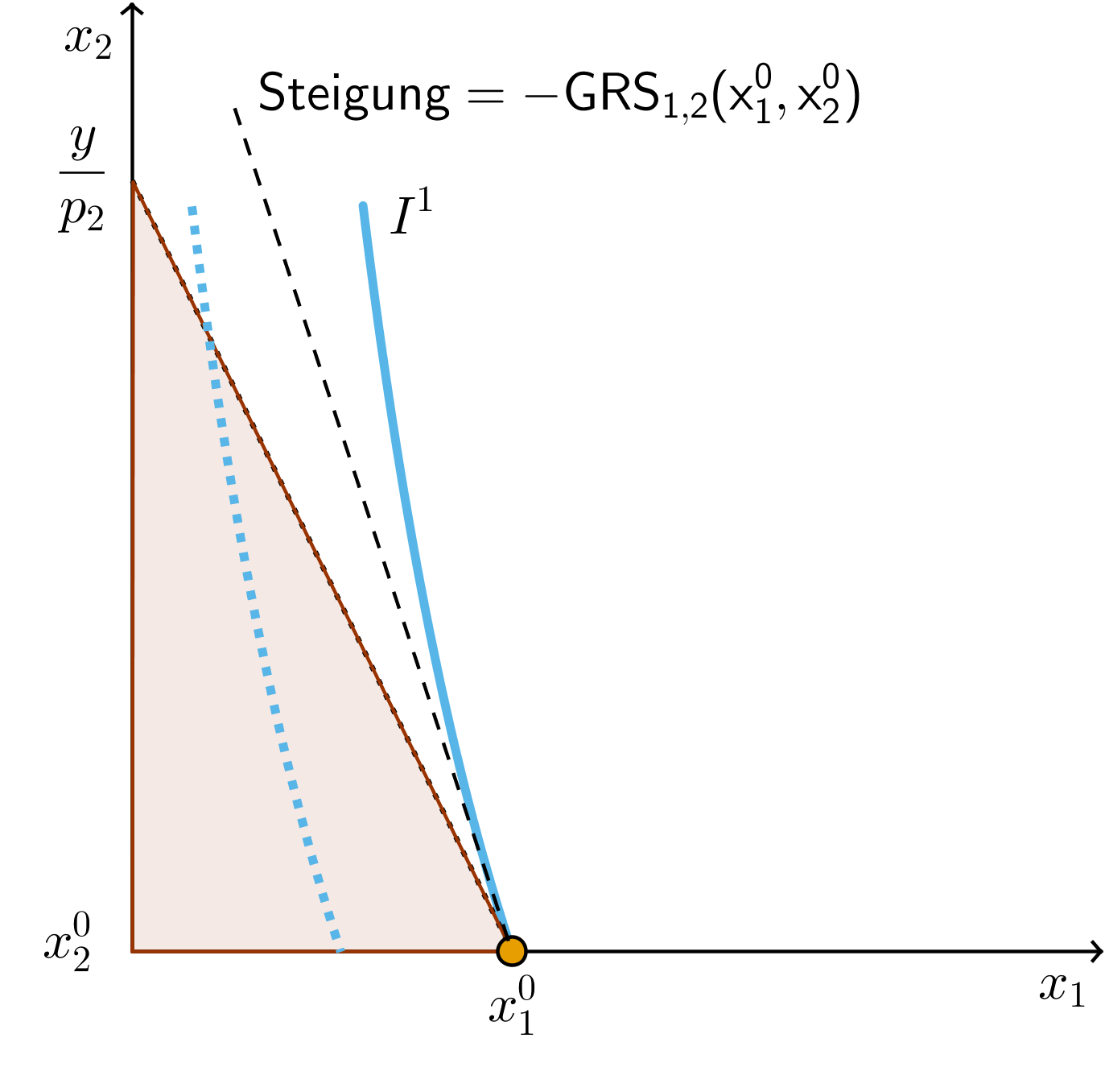 Nutzenmaximierungsproblem, Randlösung